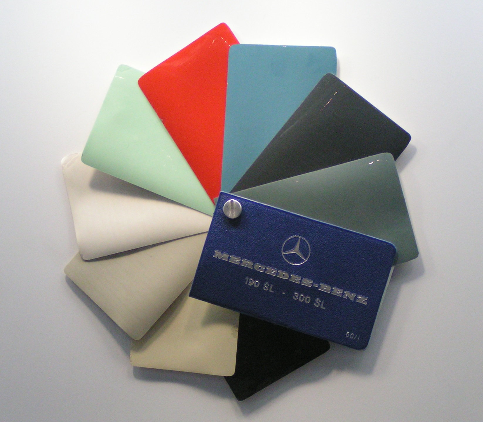 190 SL Farbpalette